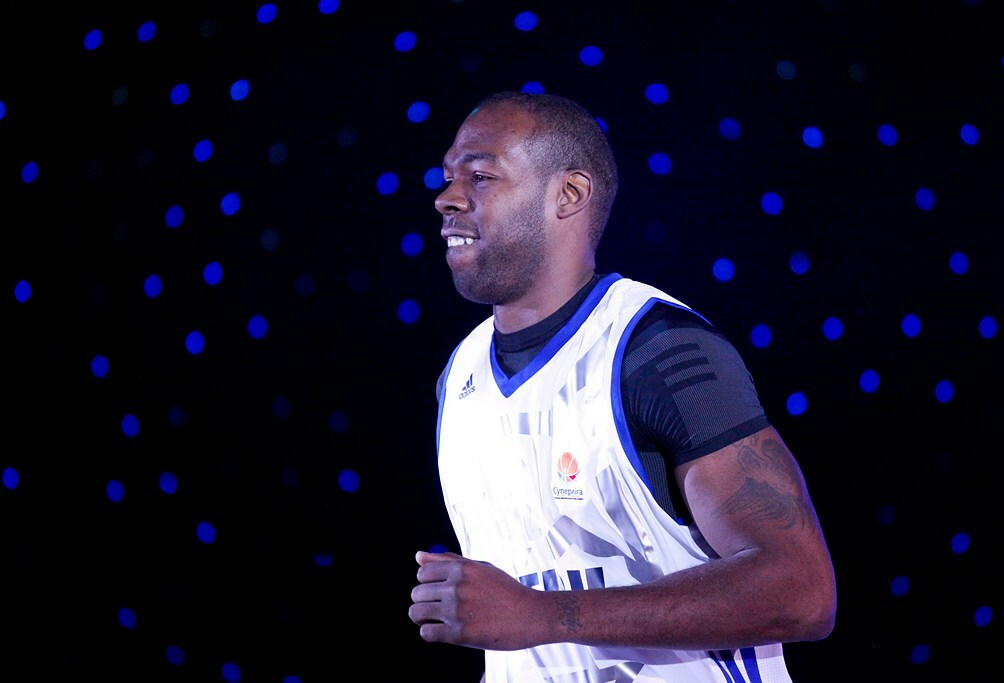 Матч всех звезд баскетбольной Суперлиги 2012. Киев. Ukrainian All-star